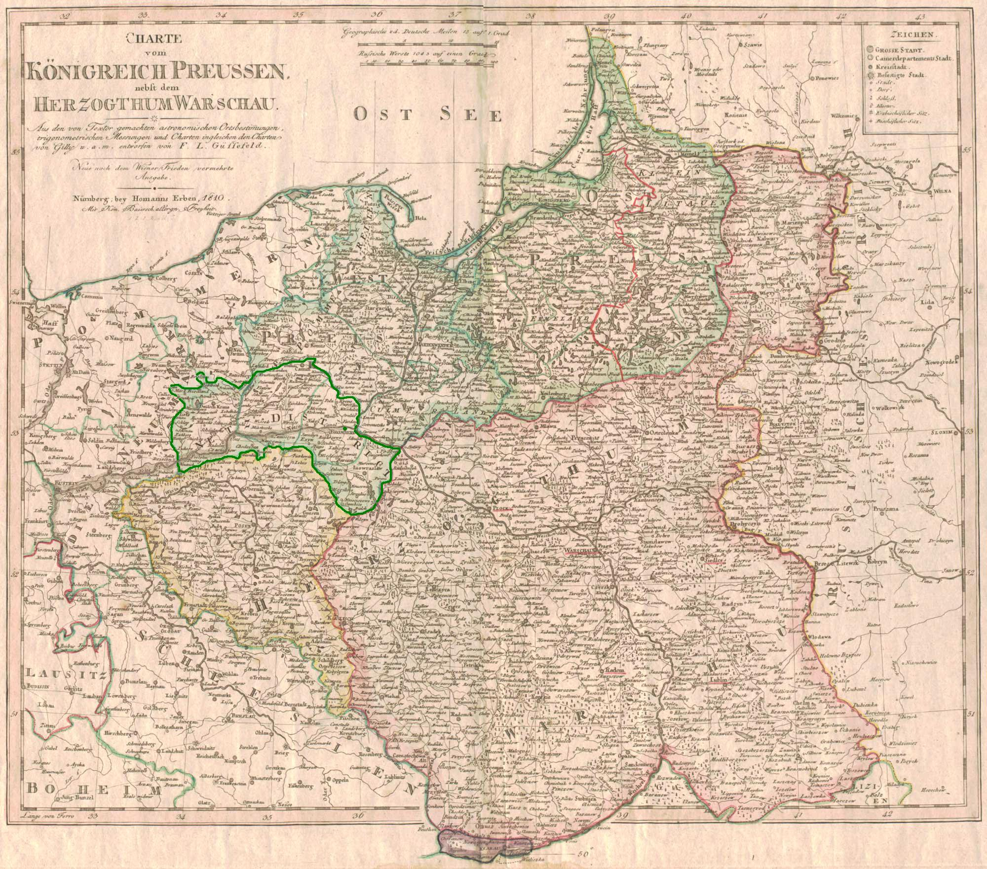 Obwód Nadnotecki na mapie Prus i Królestwa Kongresowego